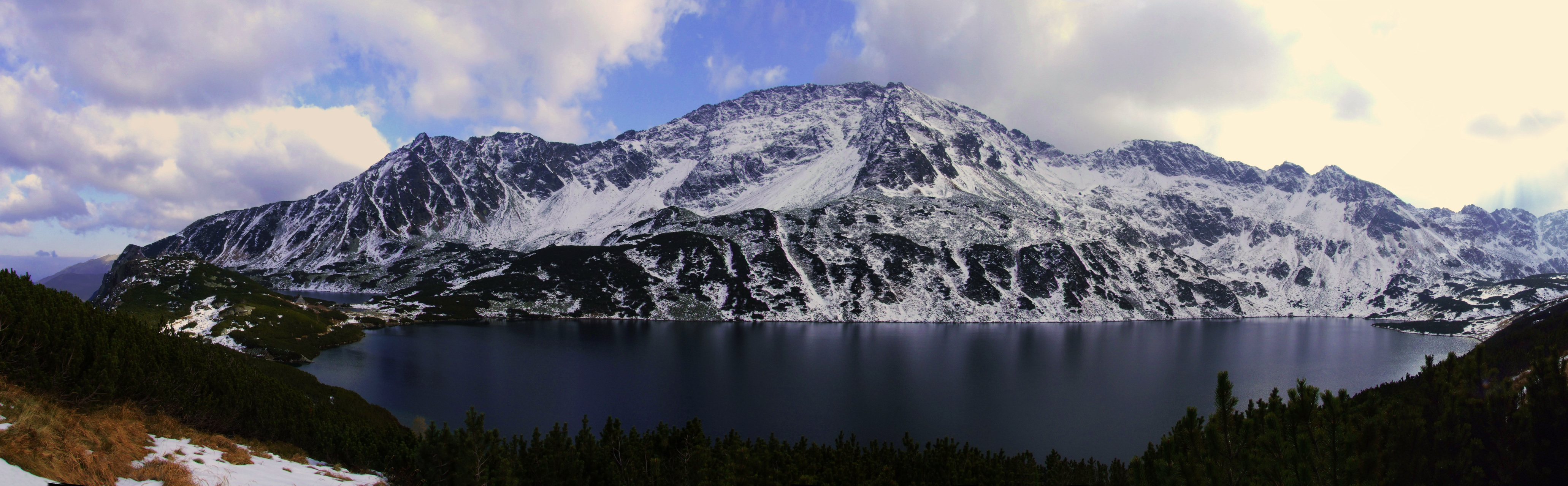 Wielki Staw Polski, masyw Miedzianego, Szpiglasowy Wierch i fragment Liptowskiej Grani